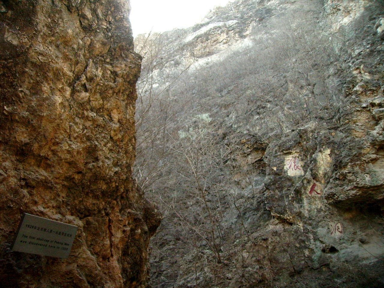 Peking Man Site at Zhoukoudian, China